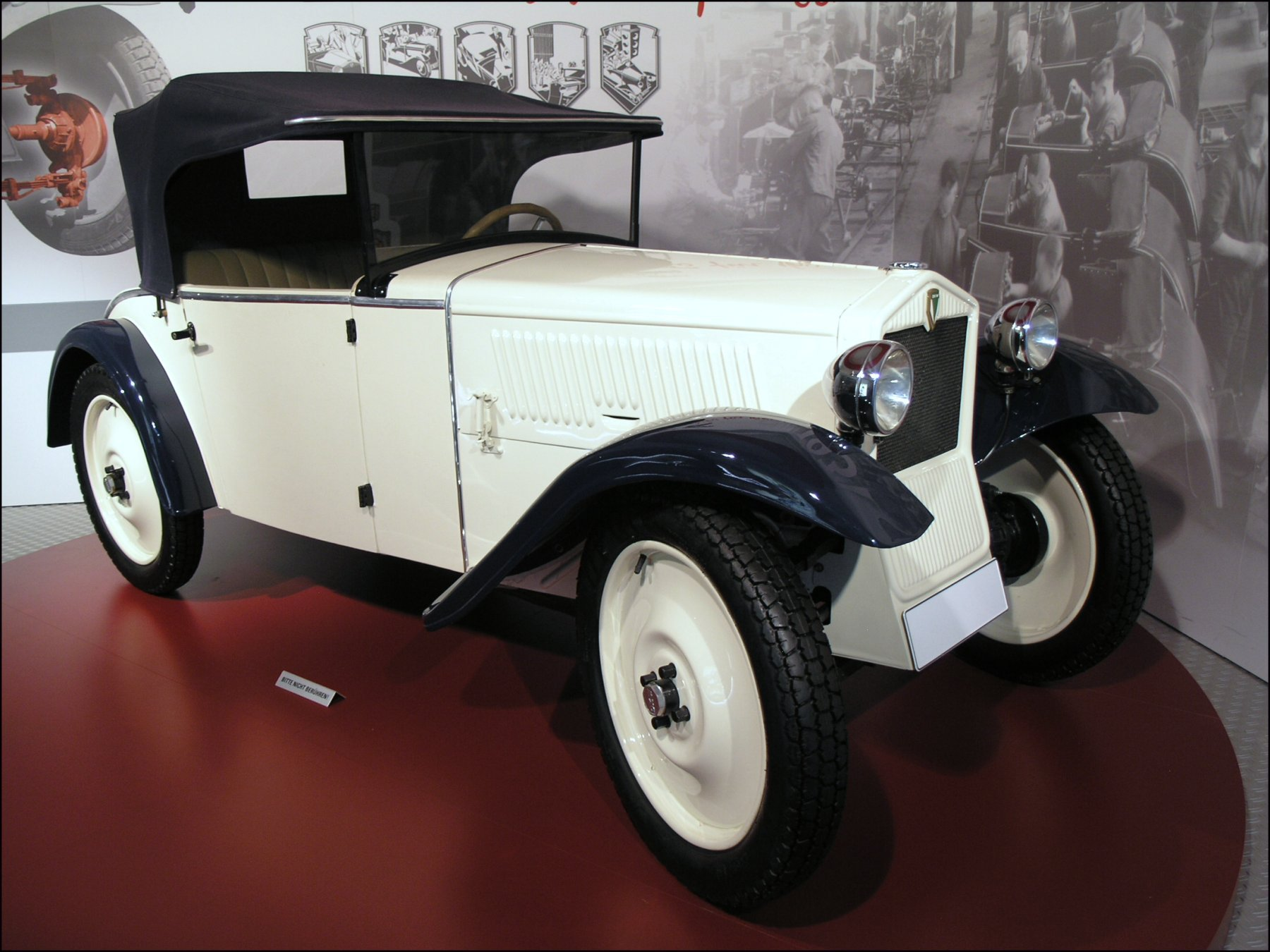 DKW Front F1 (1931)